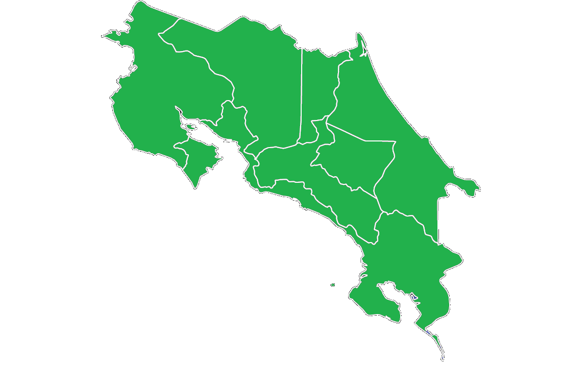 Resultados electorales provinciales 1970, fuente